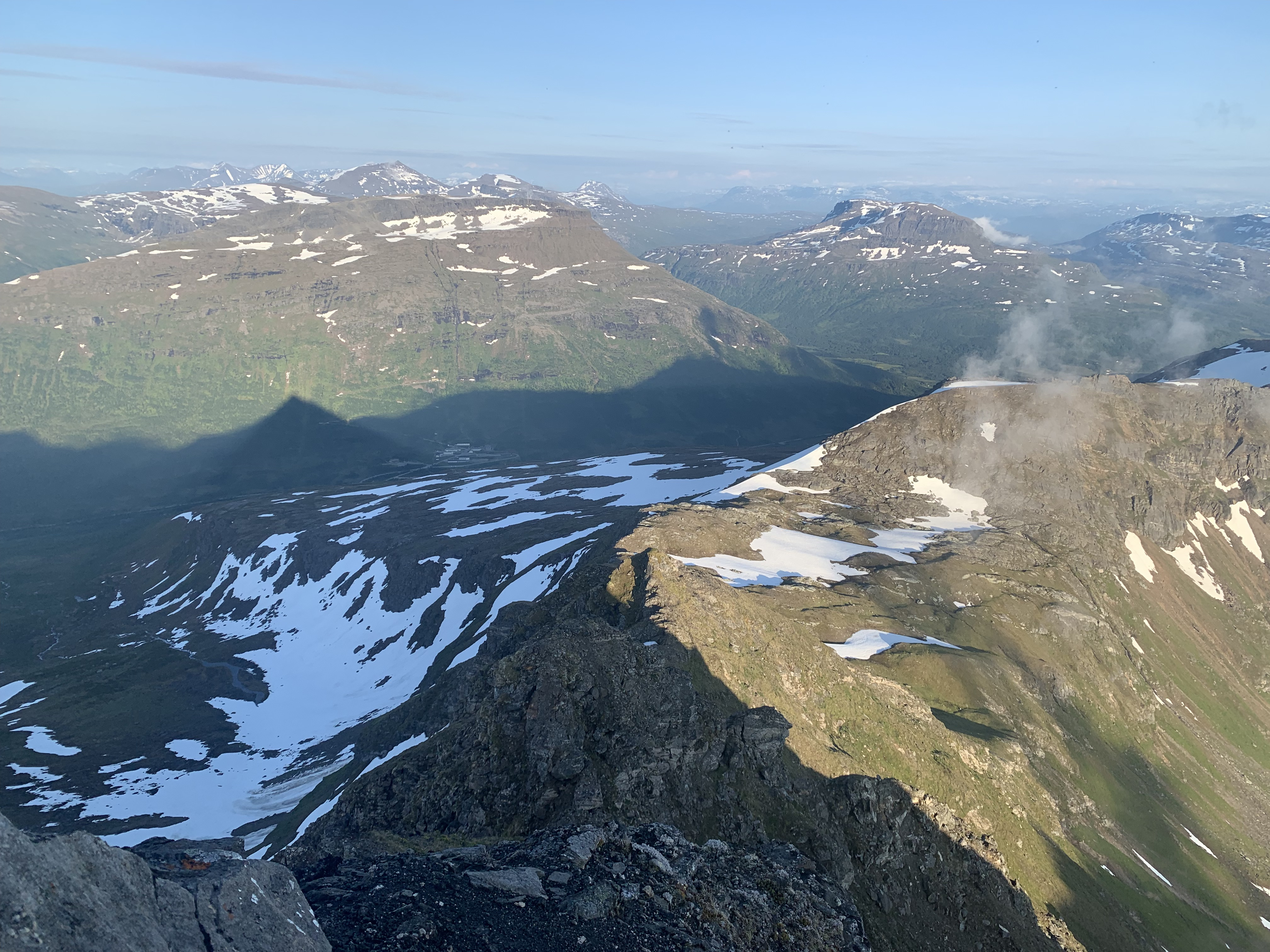 Utsikt fra Børingstinden mot Høggumpen(1028 moh.)